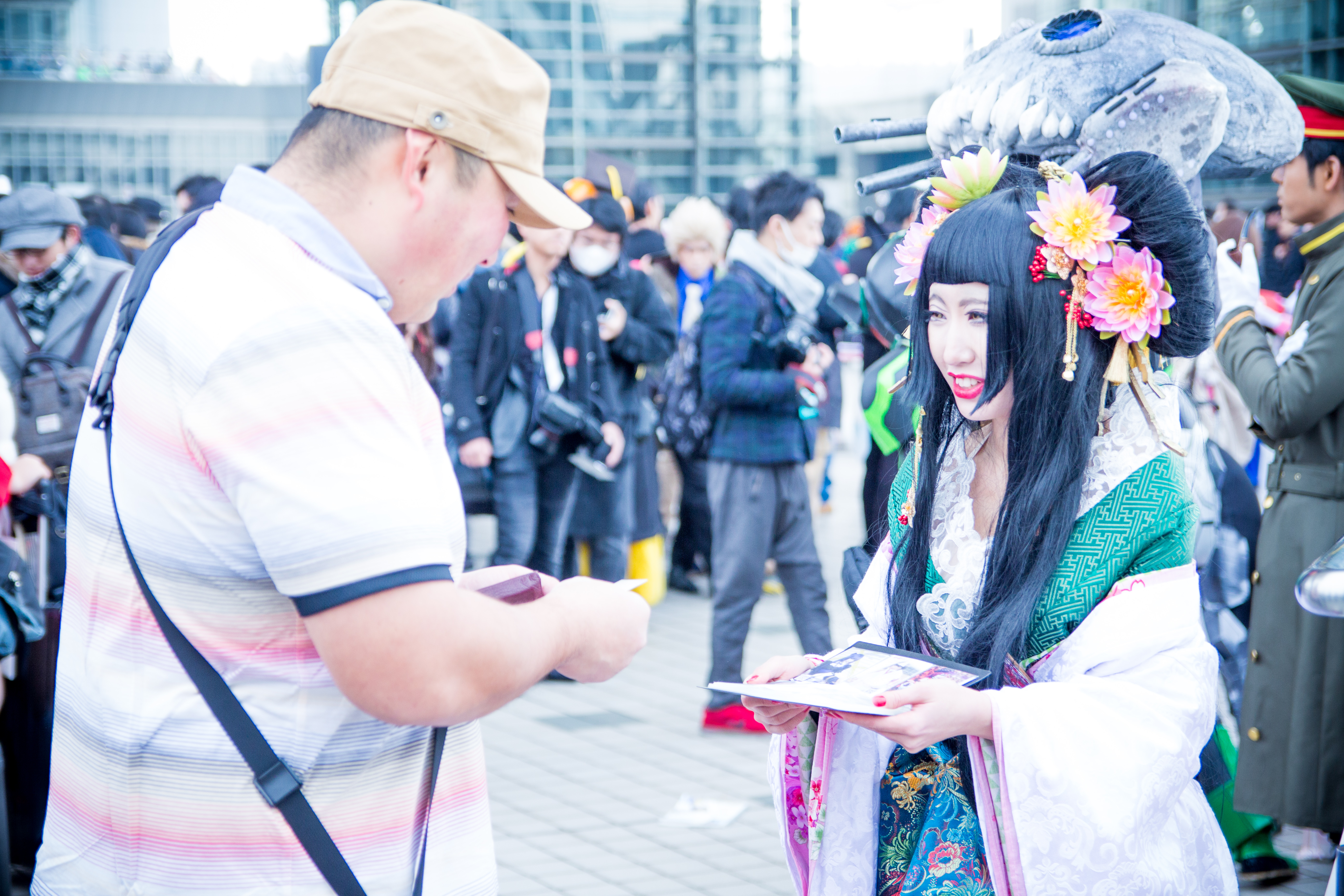 コミックマーケット91 1日目 コスプレイヤー